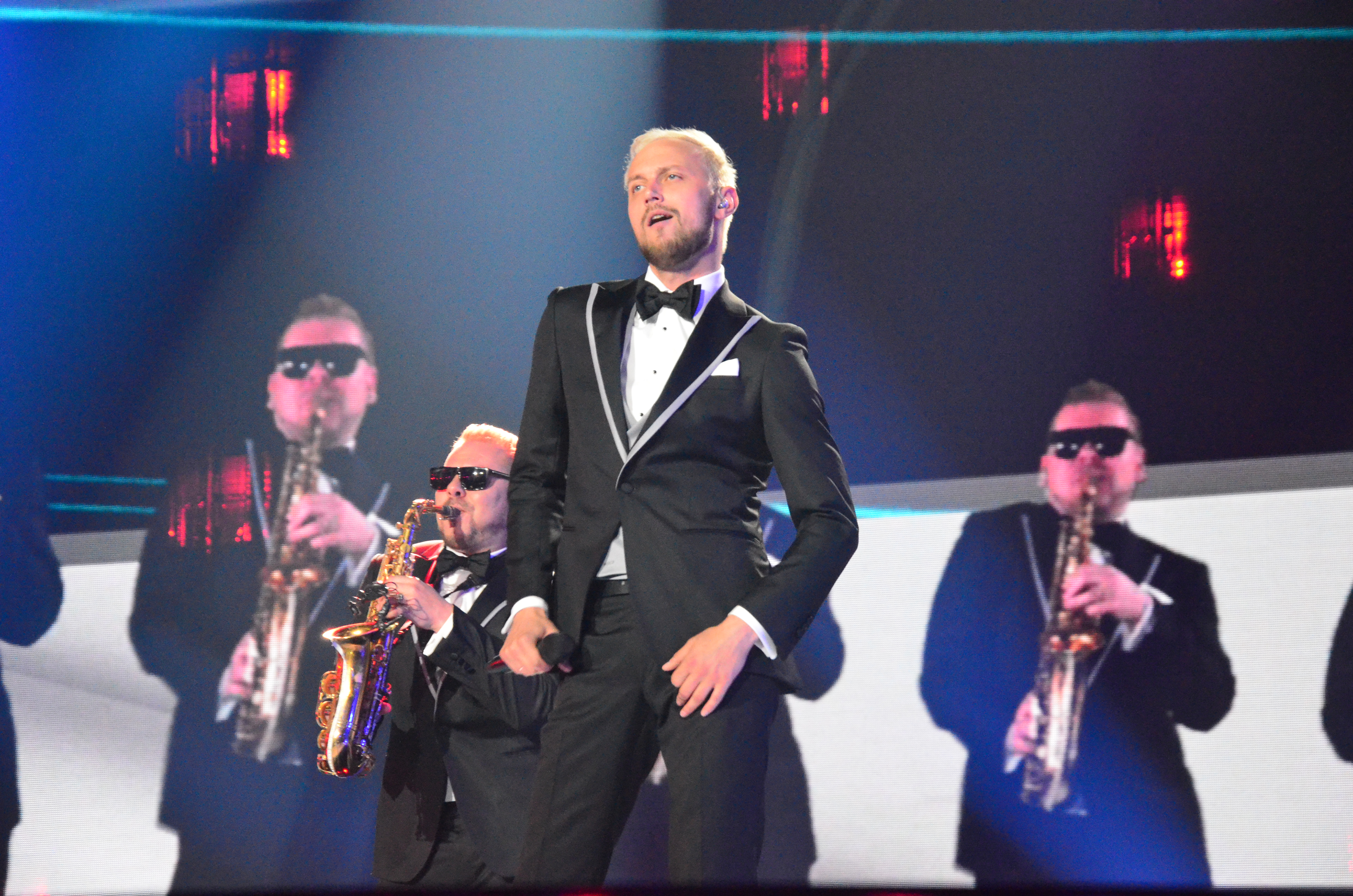 Евровидение, май 2017 года, Киев. Sunstroke Project (Moldova).